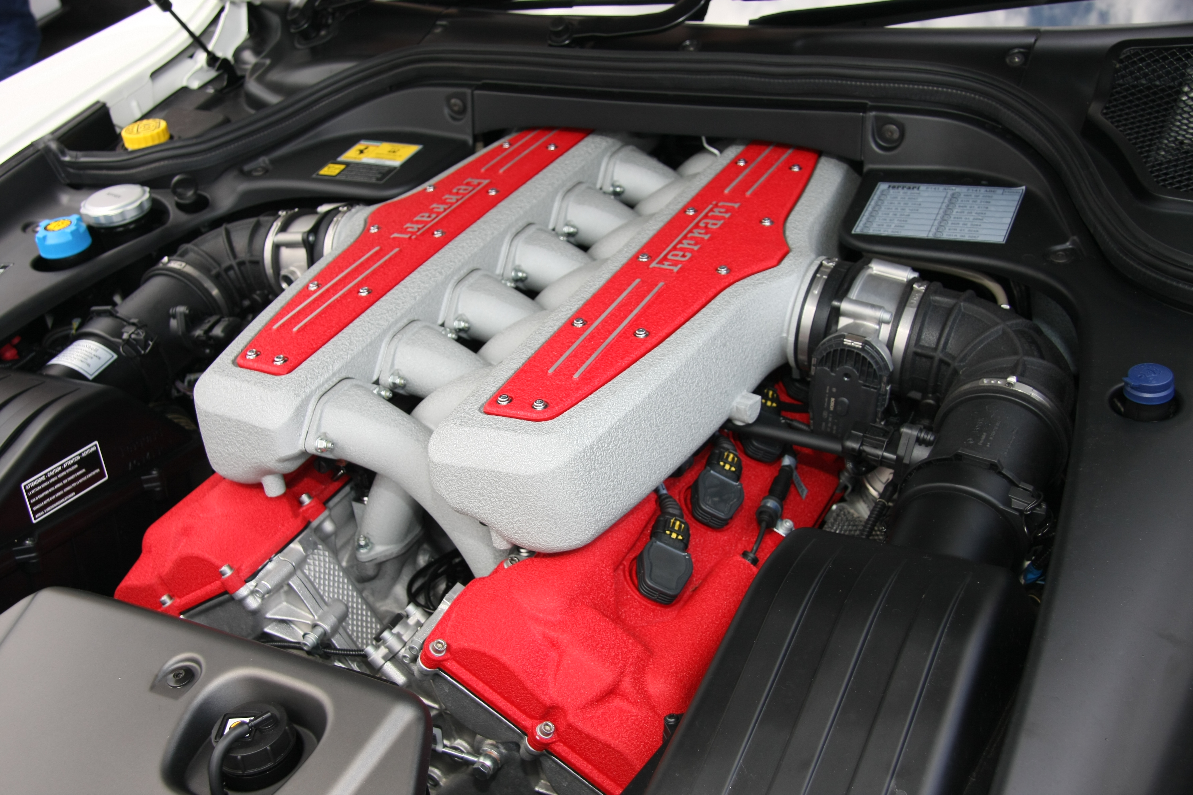 Auto Italia Italian Car Day Brooklands May 2010